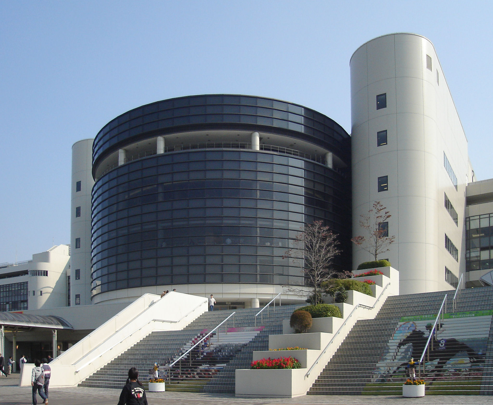 Kyoto Race course (京都競馬場 シグネットホール)